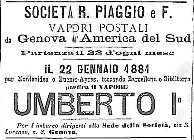 Inserzione pubblicitaria del 3.1.1881 su la Gazzetta provinciale di Bergamo, Italia - Vapori postali da Genova all'America del Sud - partenza il 22 gennaio 1881 della Umberto I